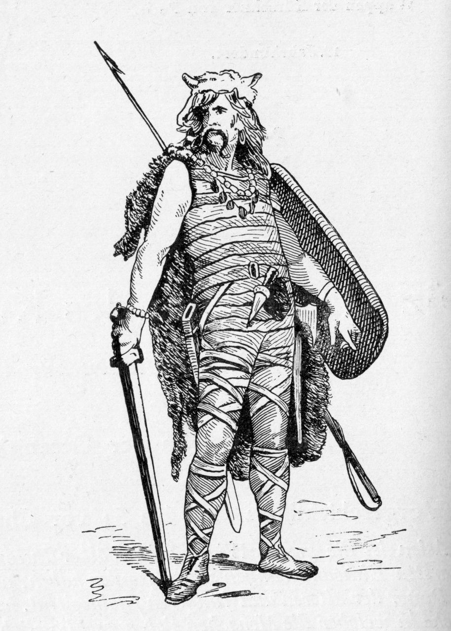 Bildunterschrift: 5. Jahrh. Fränkisch-Merowingischer Krieger